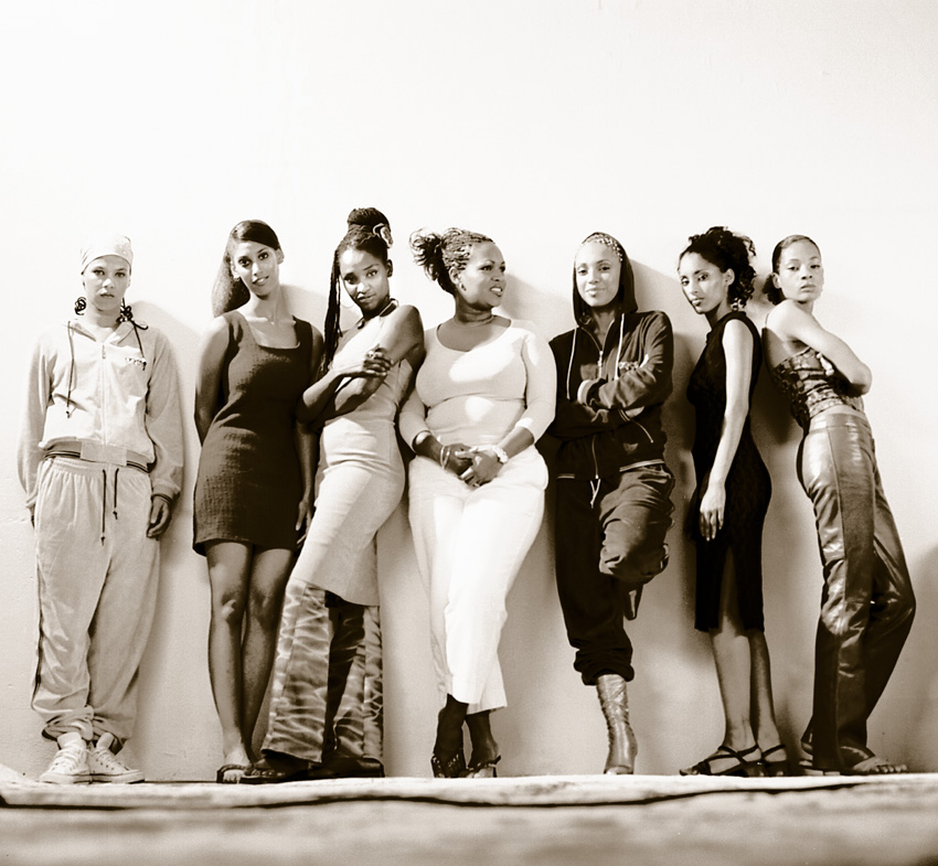 Sisters Keepers im Studio in Hamburg 2001